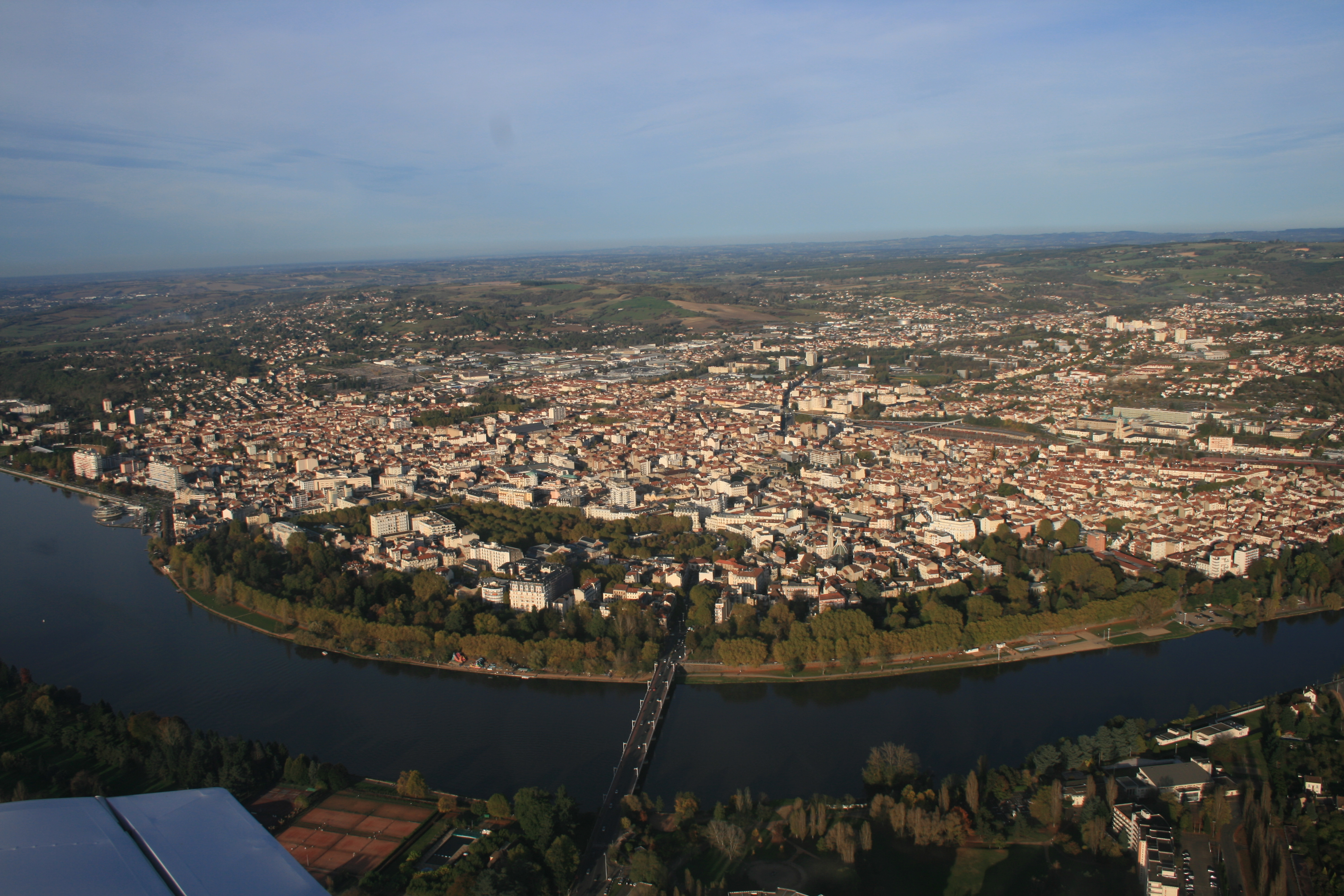 Vue aérienne de Vichy (Allier), France.